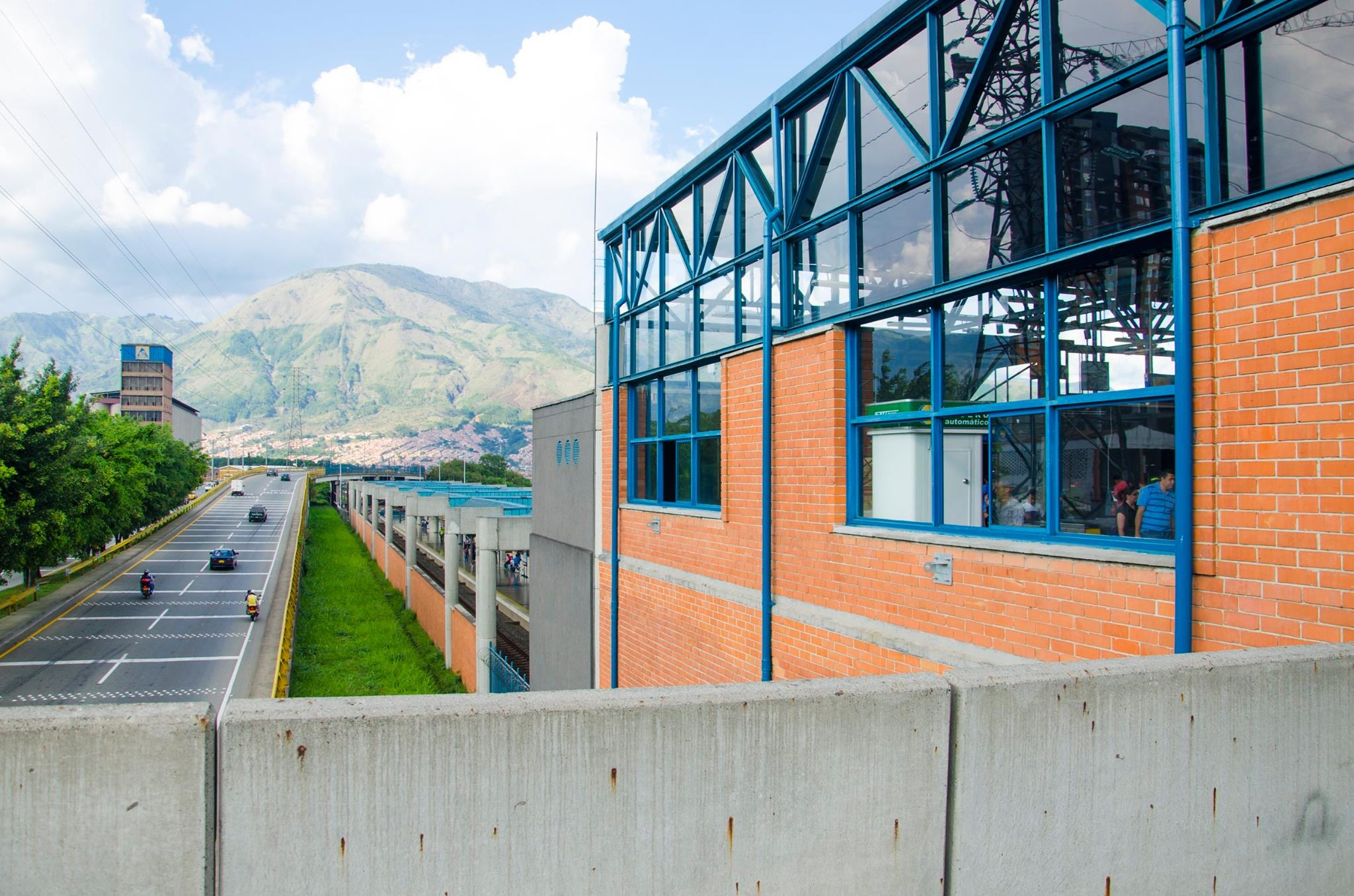 Estación Madera Metro de Medellín